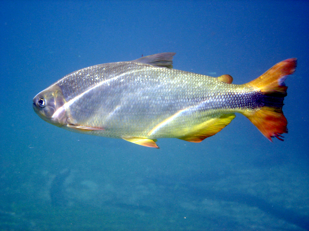 Piraputanga em Bonito.light-banded Piraputanga